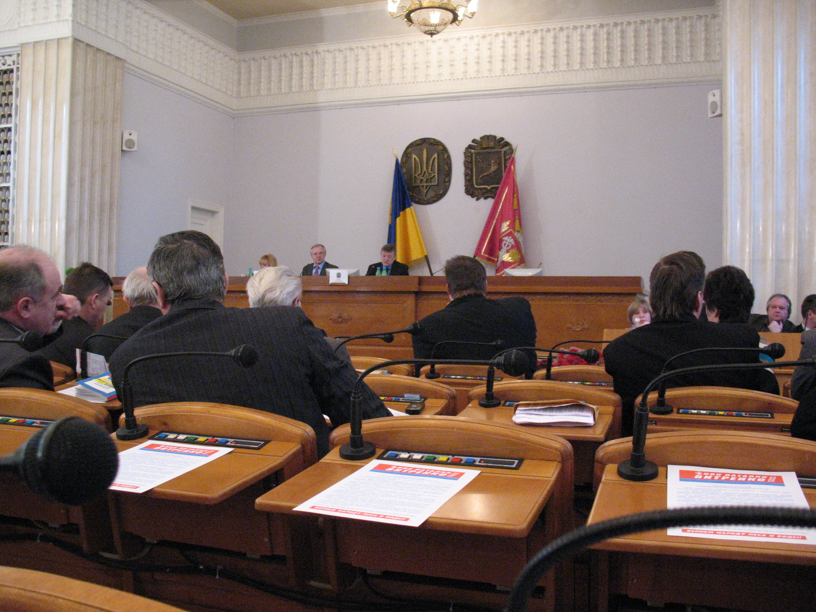 Заседание Харьковского областного совета. Председательствует Сергей Чернов. 17 апреля 2011 года.